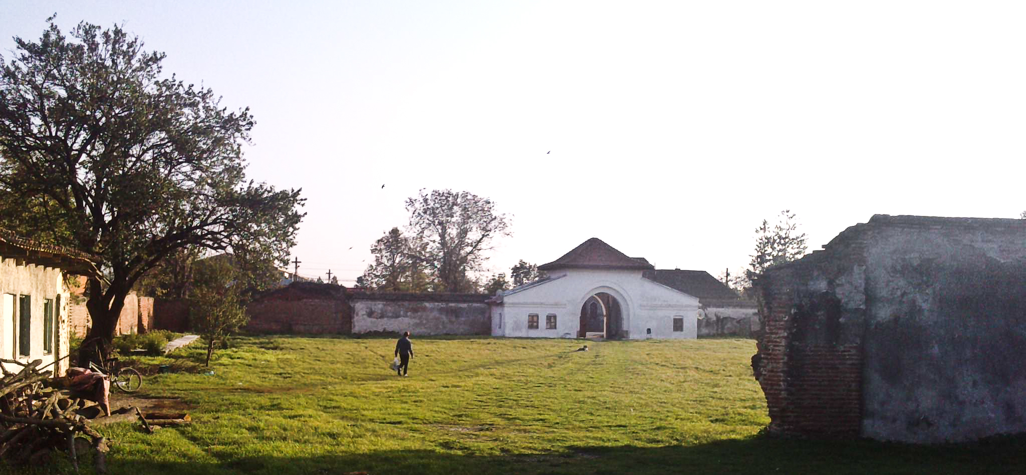 curte palat potlogi